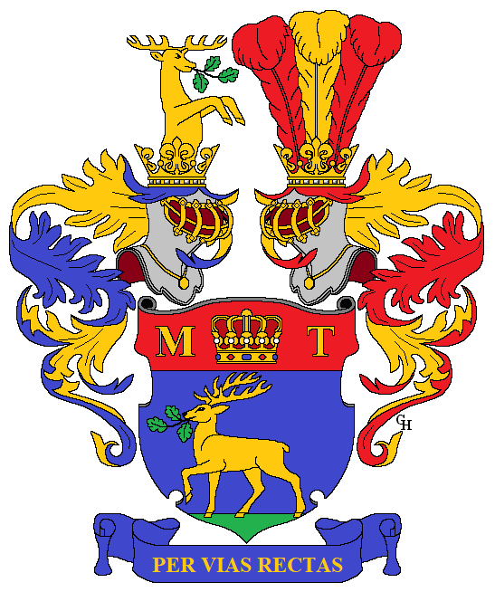 Wappen des österreichischen Juristen und Historikers Franz Ferdinand Schrötter (1736–1780), verliehen anlässlich seiner Erhebung in den Ritterstand mit dem Prädikat "von Kristelli" 1774. Zeichnung von Gerd Hruška ( nach der Original-Wappenbeschreibung im Adelsakt Schrötter von Kristelli im Bestand Österreichisches Staatsarchiv Wien, Allgemeines Verwaltungsarchiv: Adelsarchiv, Adelsakten. Für weitere Informationen zu dieser Standeserhebung siehe (